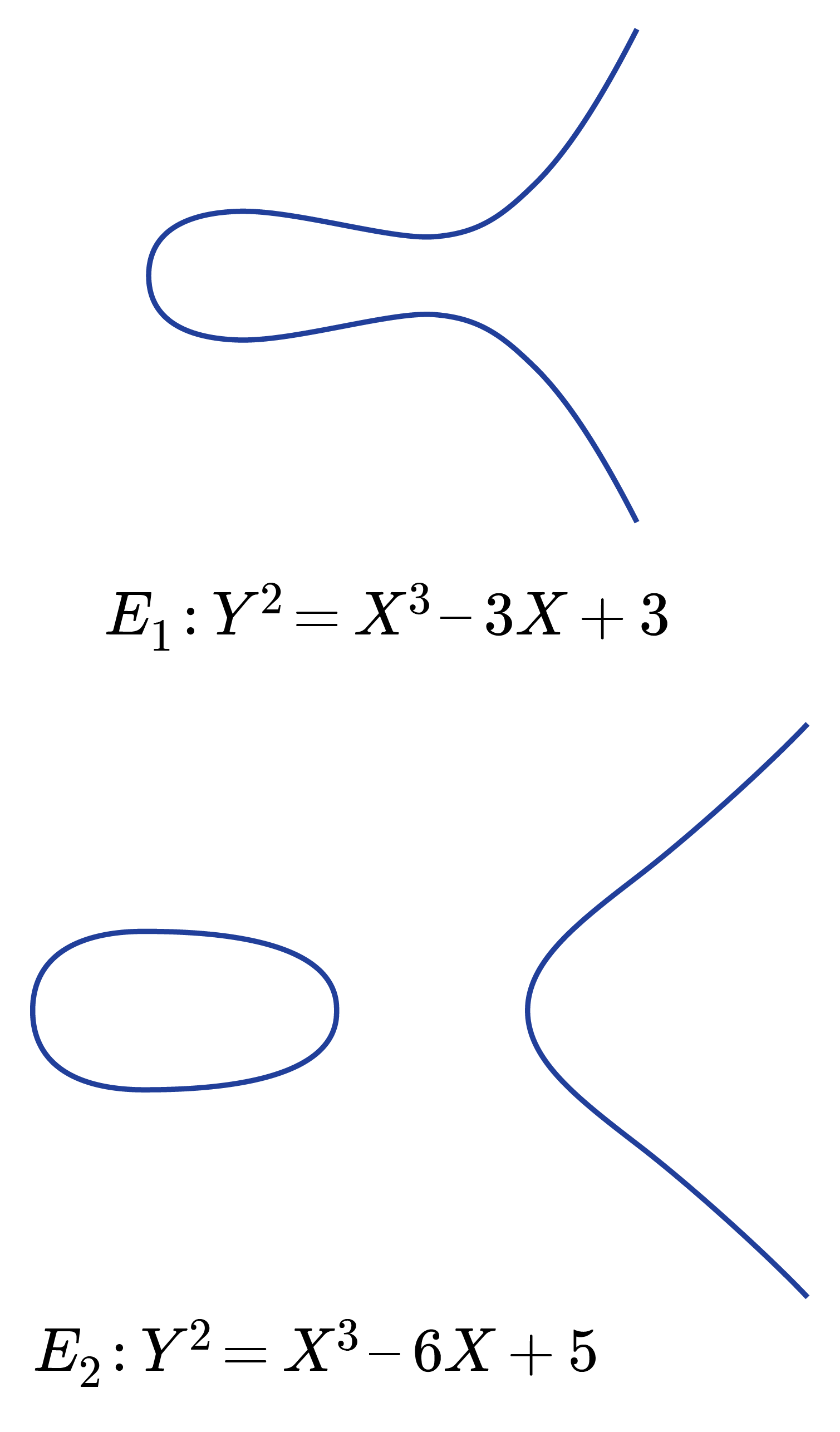 שתי דוגמאות של עקום אליפטי